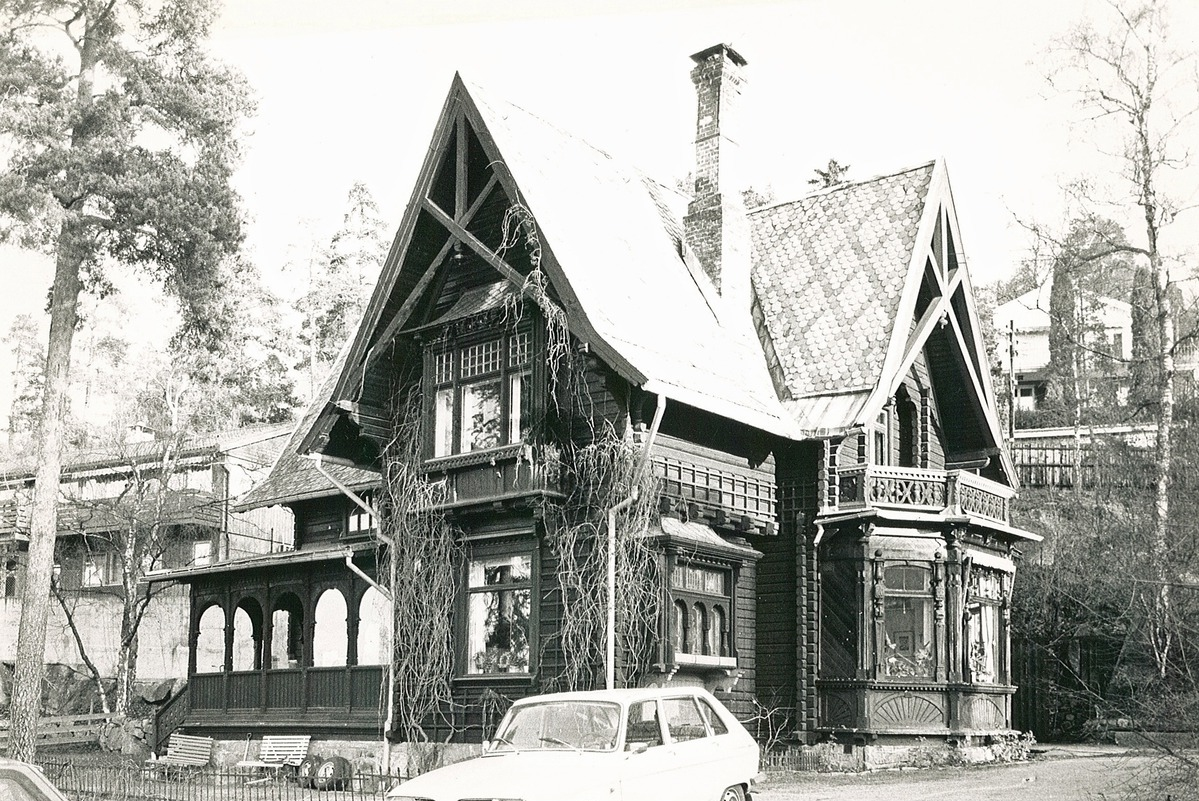 Villa Granli, Solveien 143 C